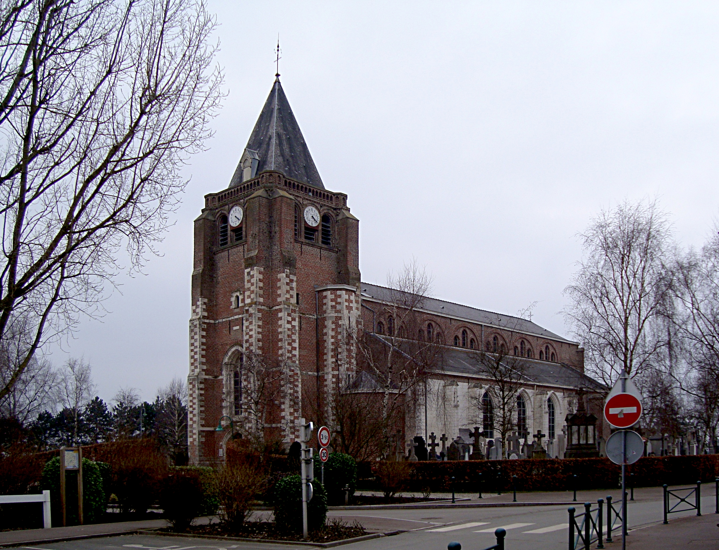 L'église Saint-Chrysole à Verlinghem (Nord).